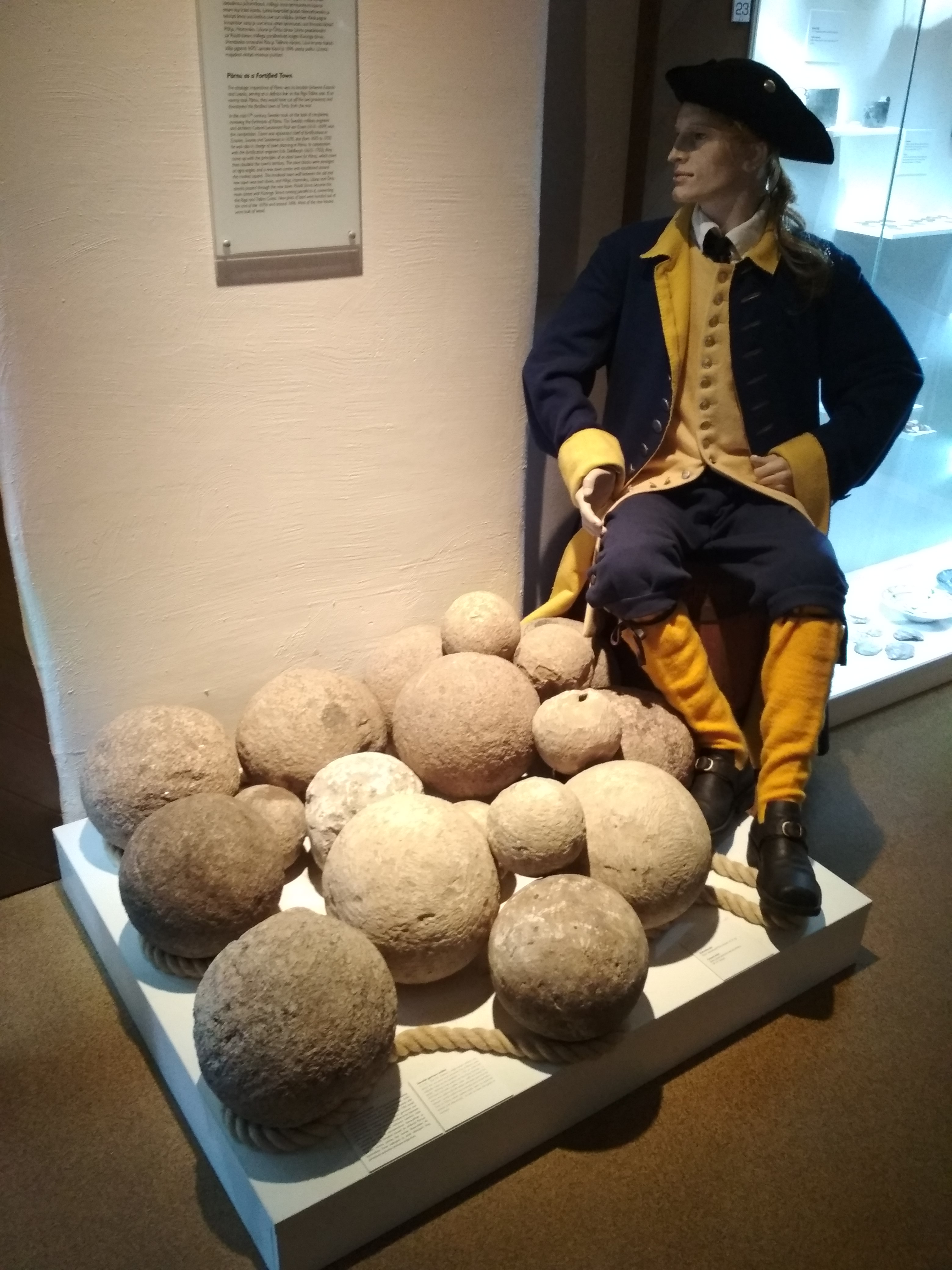 16.-17. sajandi Pärnust pärit kivist kahurikuulid ja 18. sajandi alguses Pärnus kasutatud Rootsi sõduri vormiriietus (Pärnu muuseum)